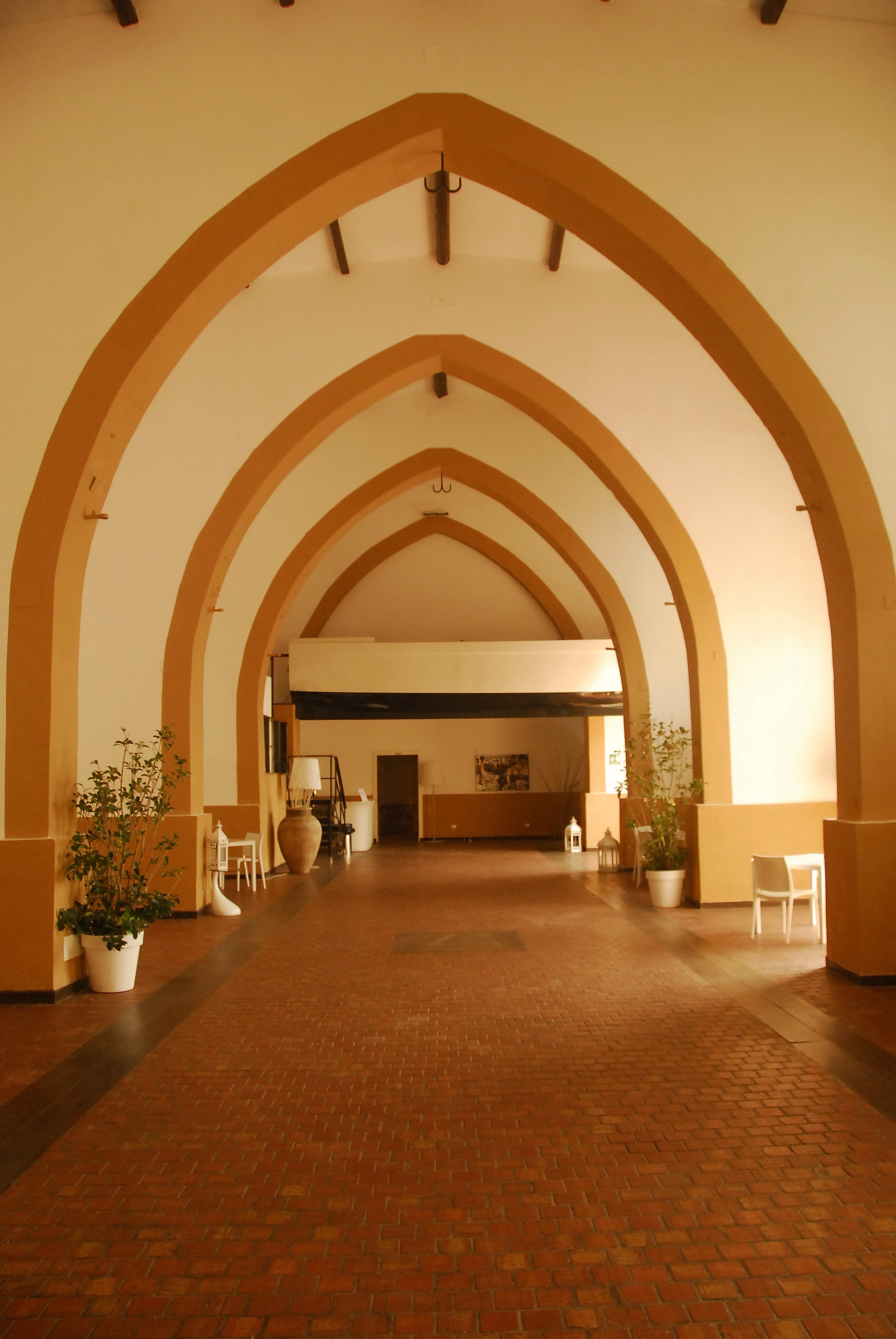 Palermo, ITA